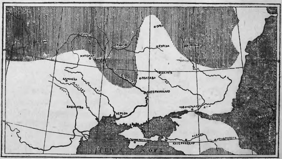 Наш край в ледові часи: ІІІ ледівцї; заштриховане темнішеTemplate:—море.